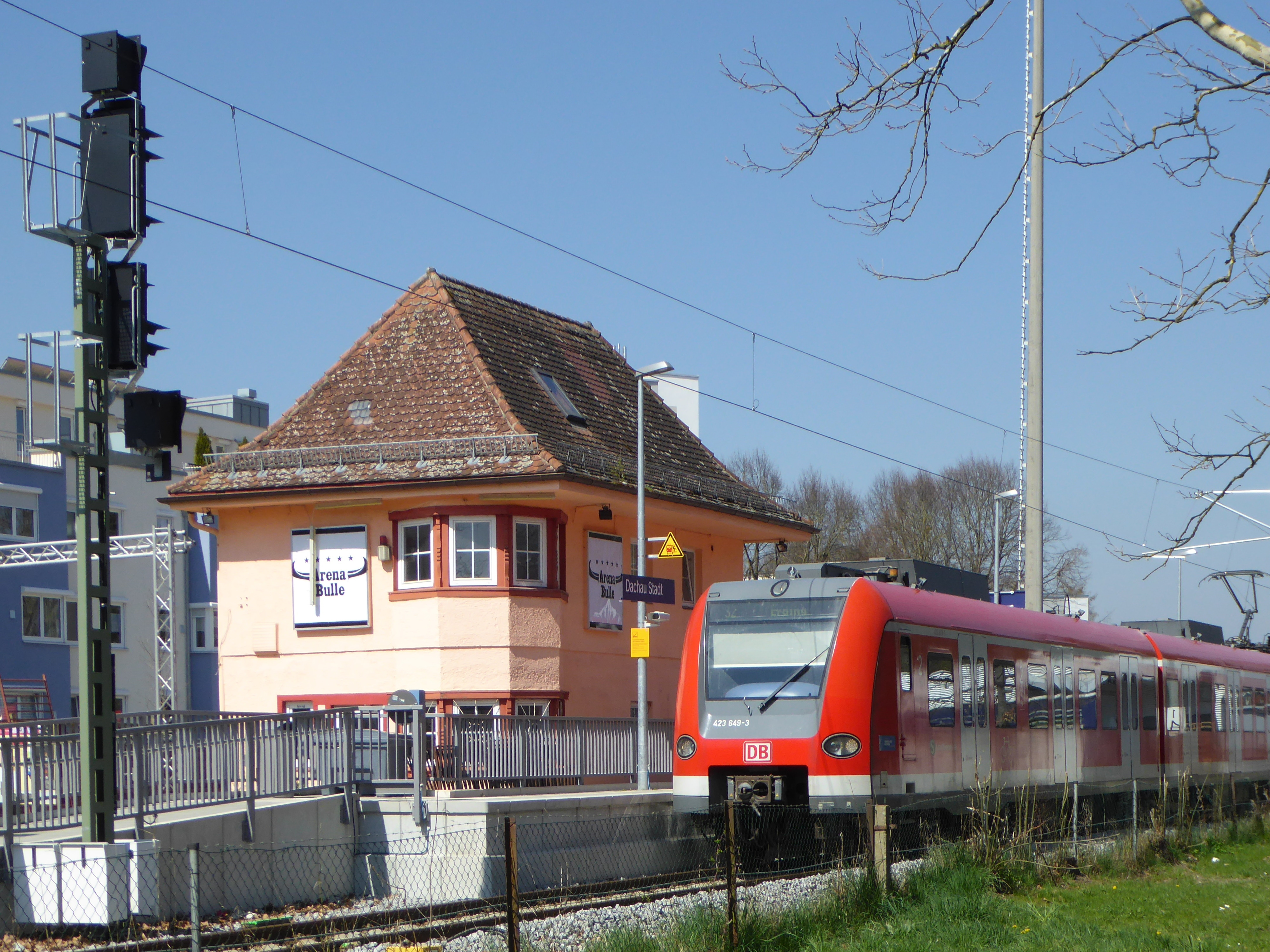 Triebzug der Münchner S-Bahn am Bahnhof Dachau Stadt.